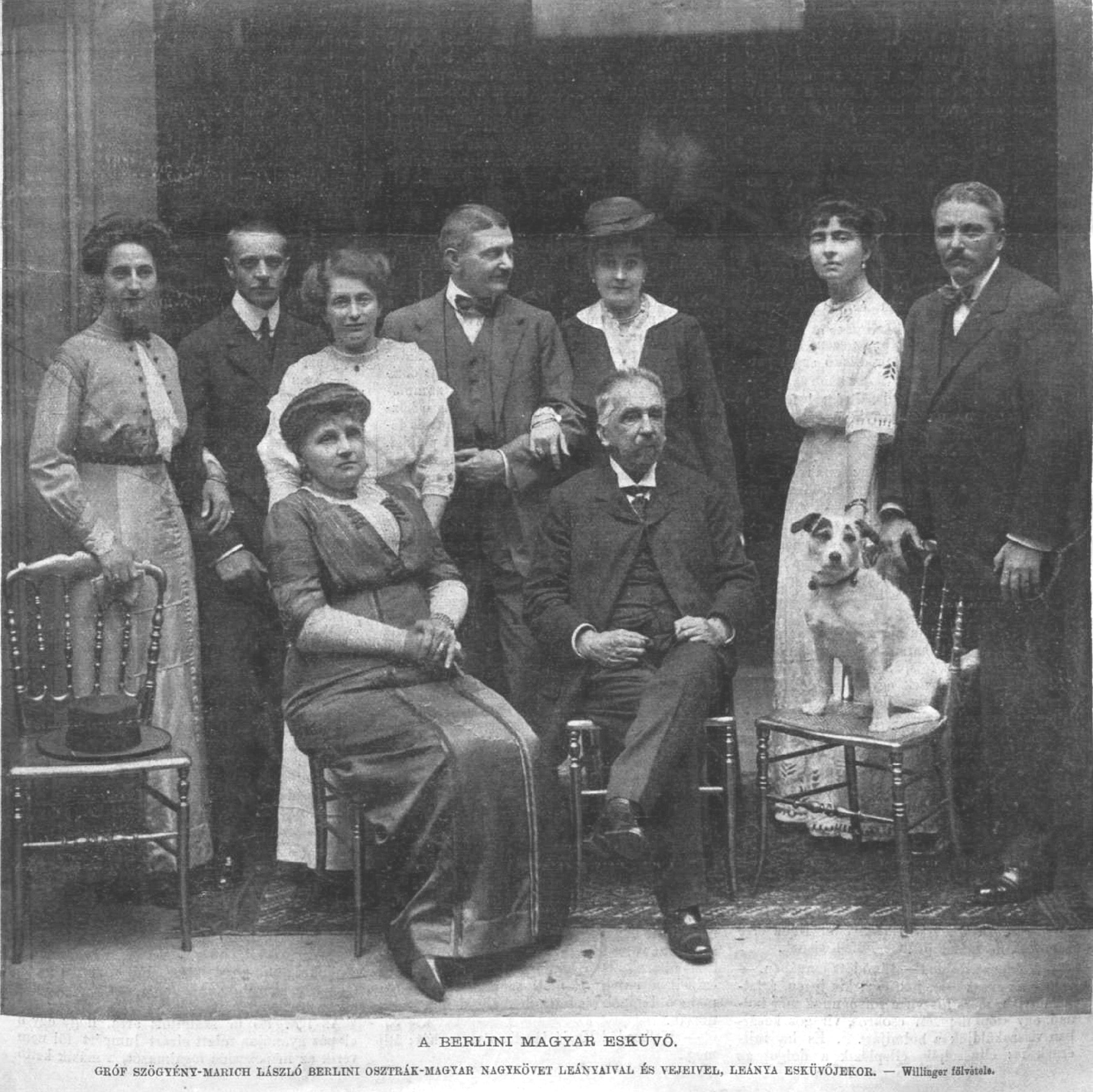 ifjabb Szőgyény-Marich László neje, lányai és vejei társaságában. (Bal szélen Ilona lánya, akit 1911-ben jegyeztek el (Vasárnapi Ujság 1911/49), mellettük Mária, aki 1913-ban ment férjhez (Vasárnapi Ujság 1913/27) és Kamilla.